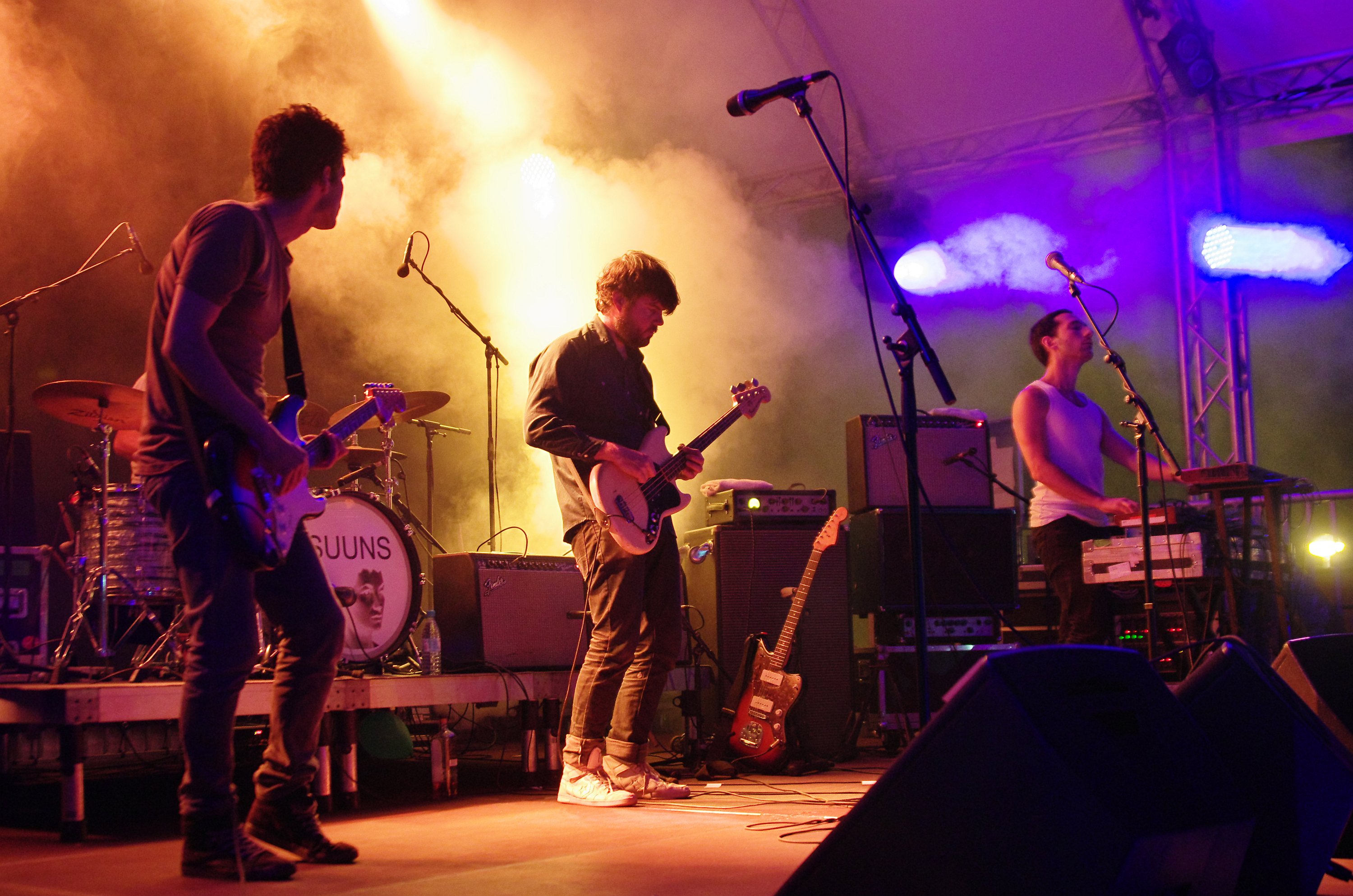 Suuns auf dem Haldern Pop Festival 2013. Besetzung: Ben Shemie (vocals, guitar), Joseph Yarmush (guitar, bass), Liam O'Neill (drums), Max Henry (keyboards, bass).